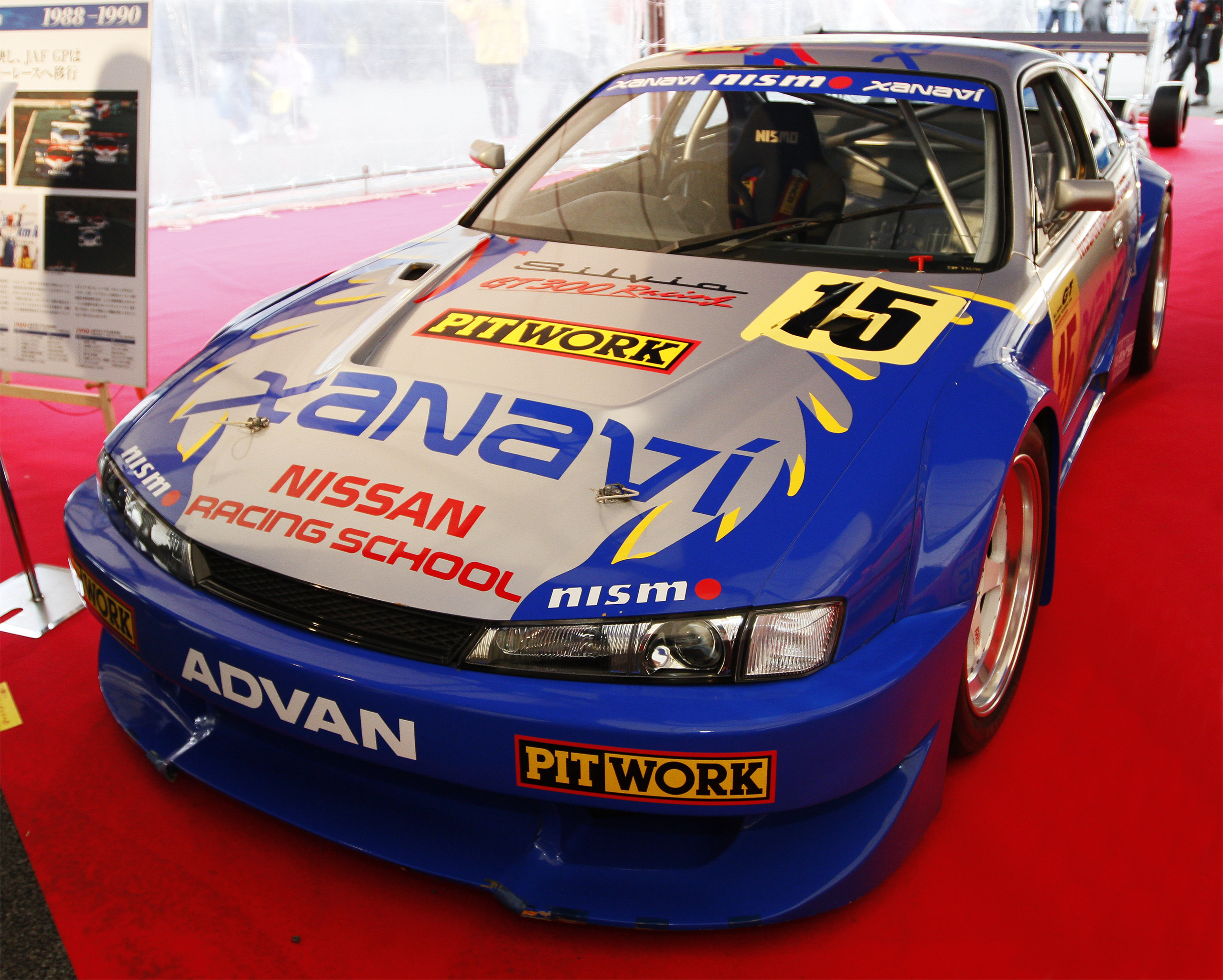 2010 JAF Grand Prix: 1998 Xanavi Silvia